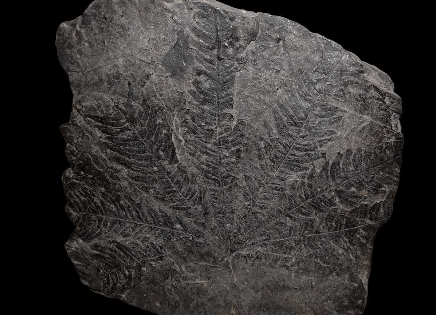 Babes Bolyai paleontology museum